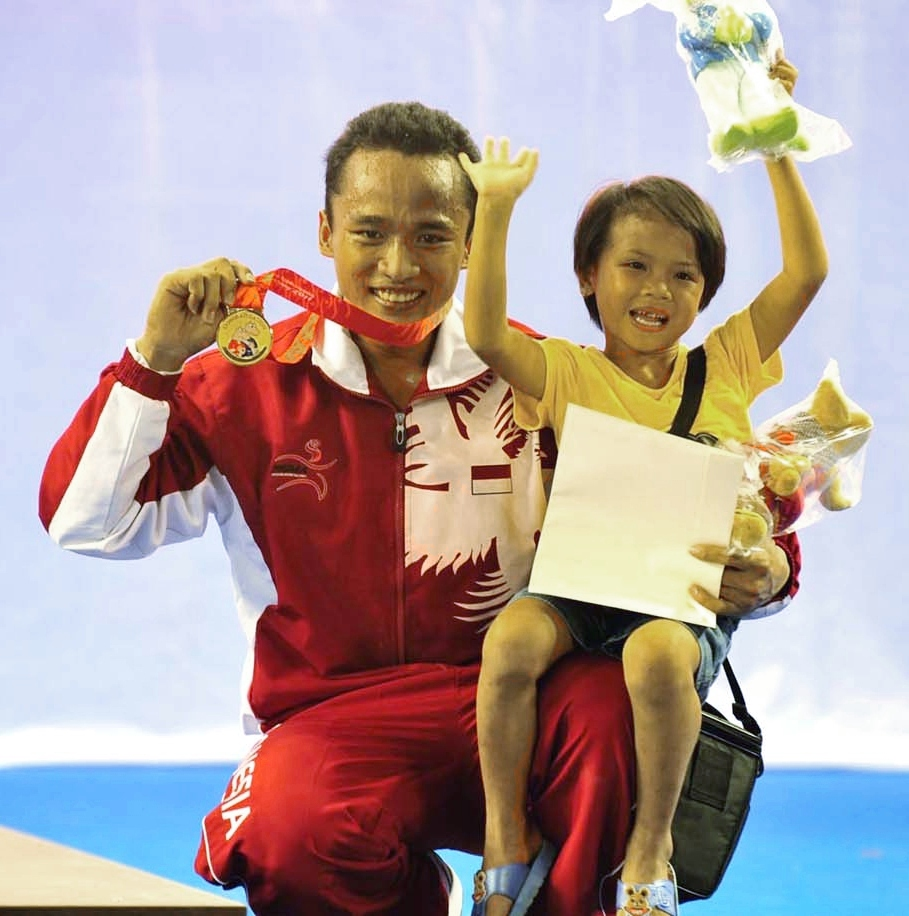 Triyatno Pecahkan Rekor Sea Games